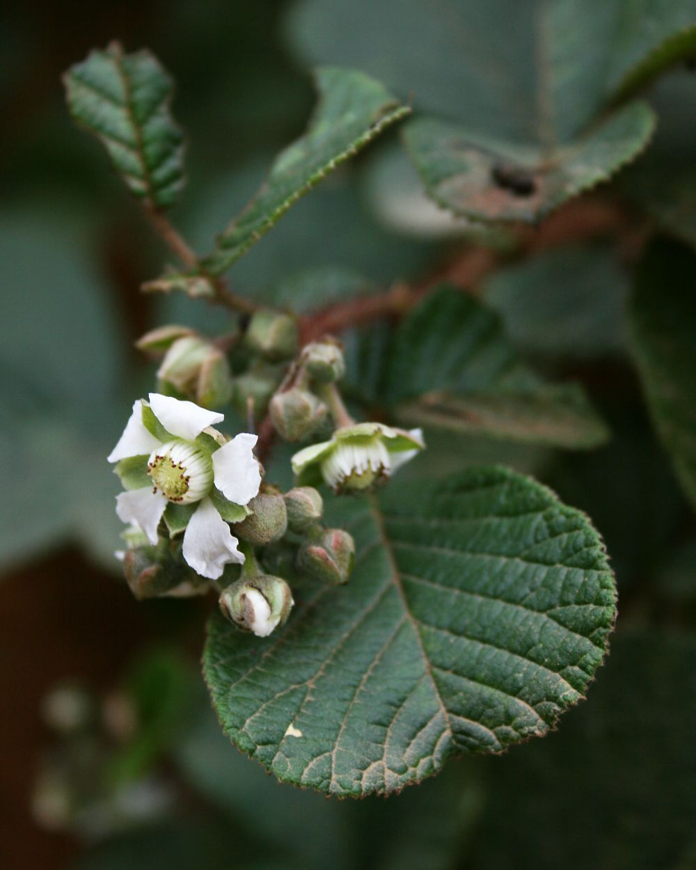 Rubus ellipticus var. obcordatus, Rosengewächse (Rosaceae) - Vietnam/Việt Nam: Dorf Cán Cấu nördlich von Bắc Hà (Prov. Lào Cai)